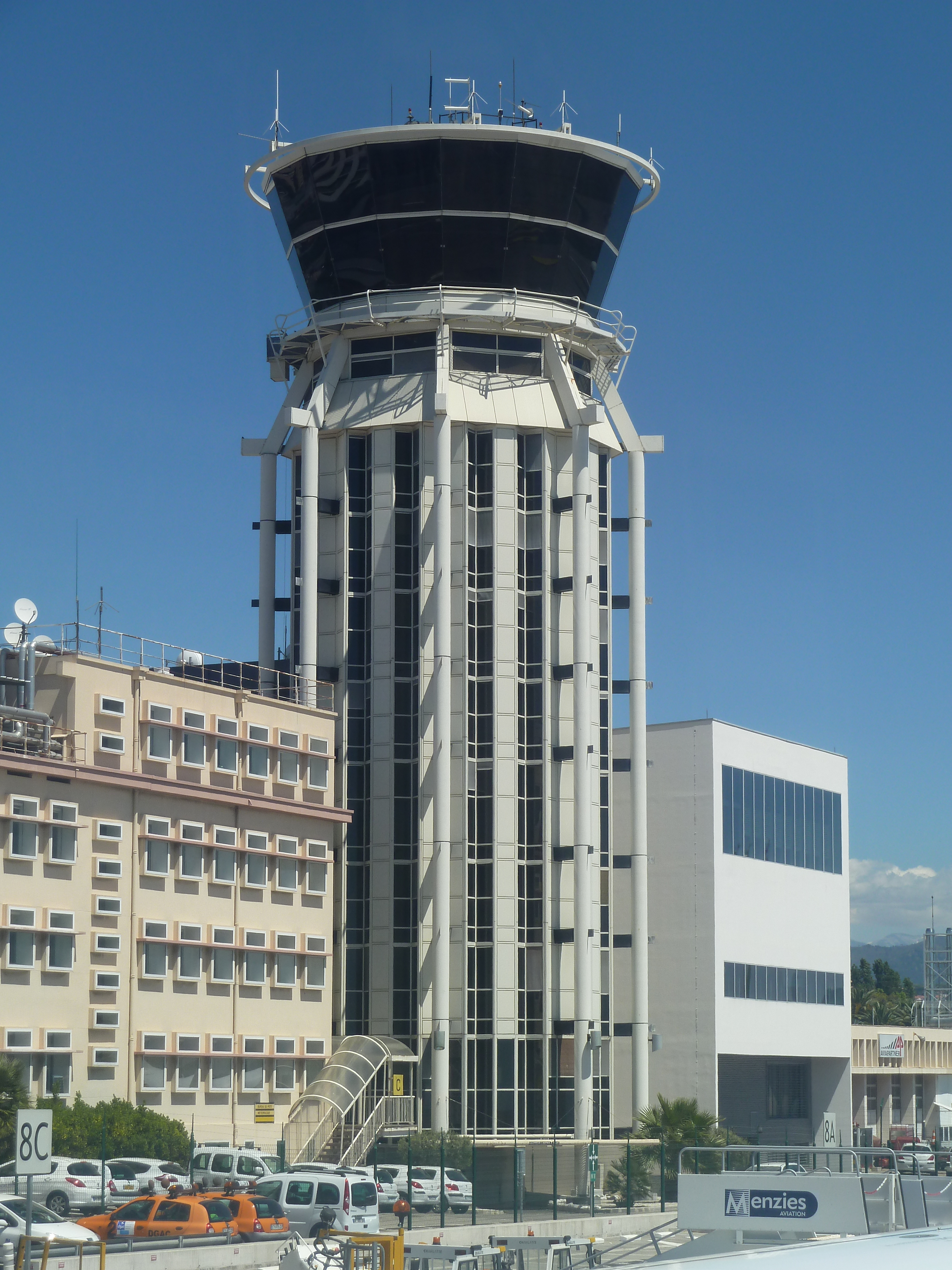 Tour de contrôle